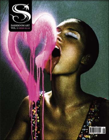 Cover S Magazine Issue 1 Photograf: Lars H Model: Unknown Fundet på & Rettighedshaver=S Magazine & Lars H Tilladelse=editor in chief Jens Stoltze